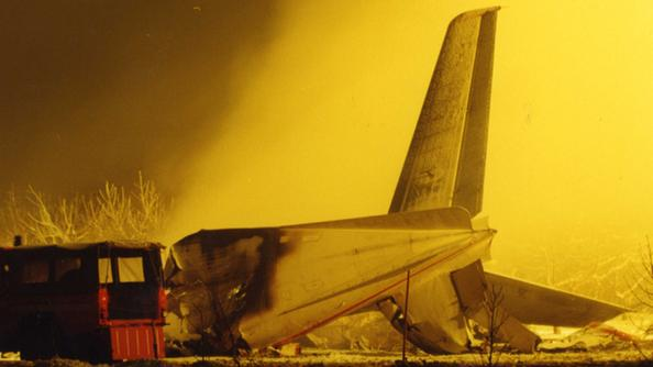 Incidente aereo a Villafranca di Verona del volo Banat Air 166